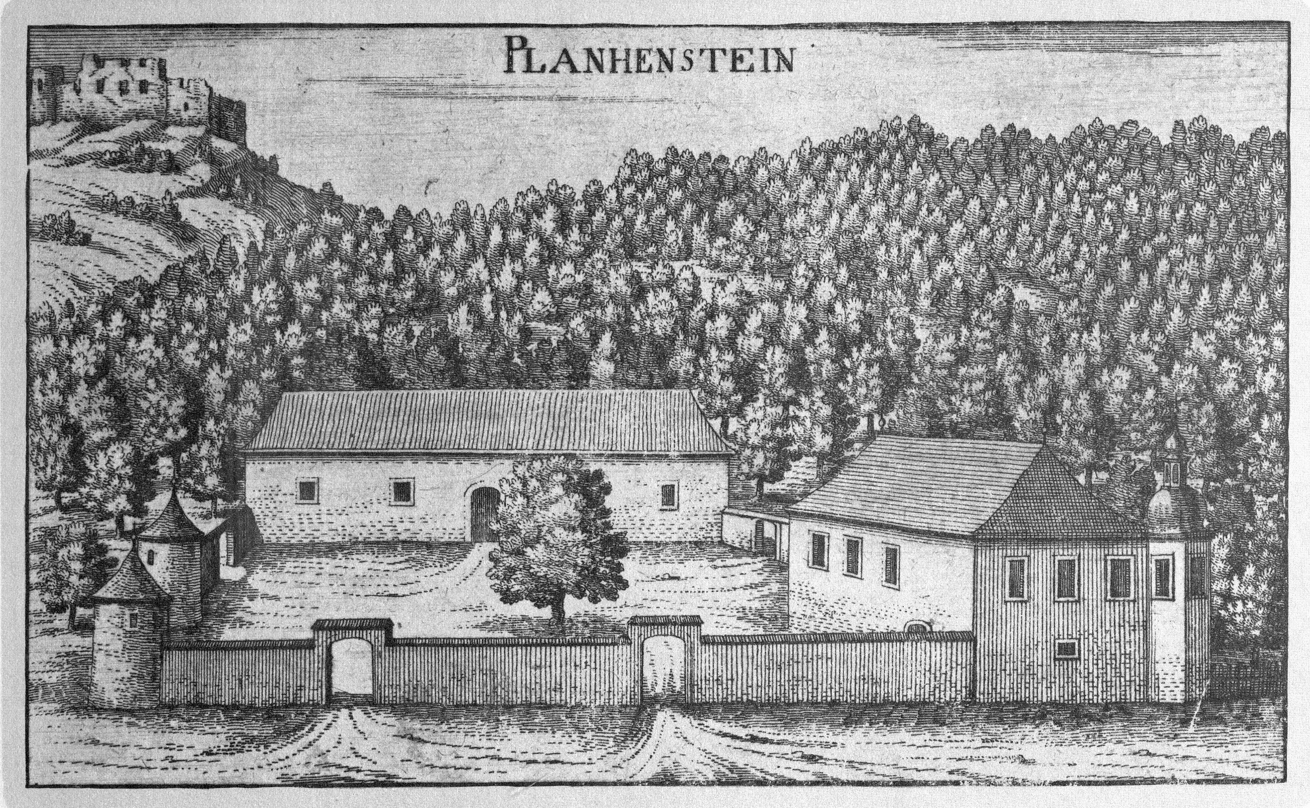 G. M. Vischers Käyserlichen Geographi, Topographia Ducatus Stiriae, Das ist: Eigentliche Delineation / und Abbildung aller Städte / Schlösser / Marcktfleck / Lustgärten / Probsteyen / Stiffter / Clöster und Kirchen / so es sich im Herzogthumb Steyrmarck befinden; Und anjetzo Umb einen billichen Preyß zu finden seynd Bey Johann Bitsch Universitäts Buchhandlern / Auff dem Juden=Platz bey der guldenen Saulen. Graz 1681 Die Nummerierung der Dateien folgt der alphabetischen Reihung der Ortsnamen und entspricht nicht dem Vischer-Register